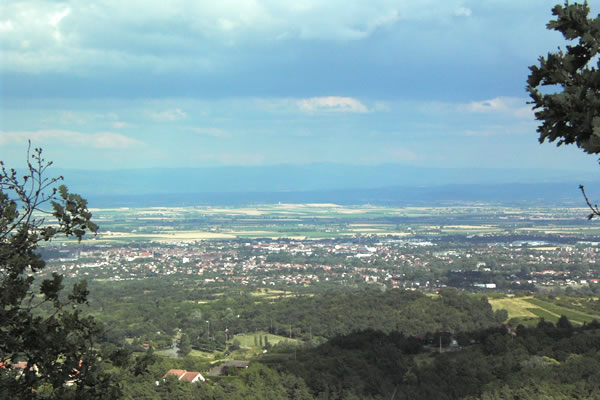 Ville de Riom vue depuis Montaclier Contents 1 Auteur 2 Licence et droits d'auteur 3 Licensing 4 Original upload log Auteur Photographie prise en juillet 2004 par Spone Site perso Licence et droits d'auteur Sous licence GFDL. J'autorise l'utilisation à condition que mon nom (Hans "Spone" Lemuet) soit cité. J'apprécie également que l'on m'avertisse par e-mail à . Hans "Spone" Lemuet juillet 2004